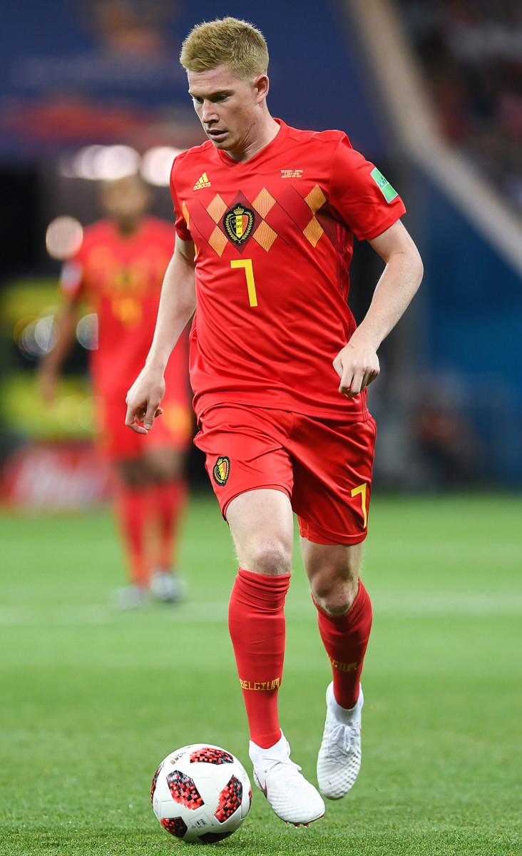 Потрясающий камбэк сборной Бельгии в матче с Японией